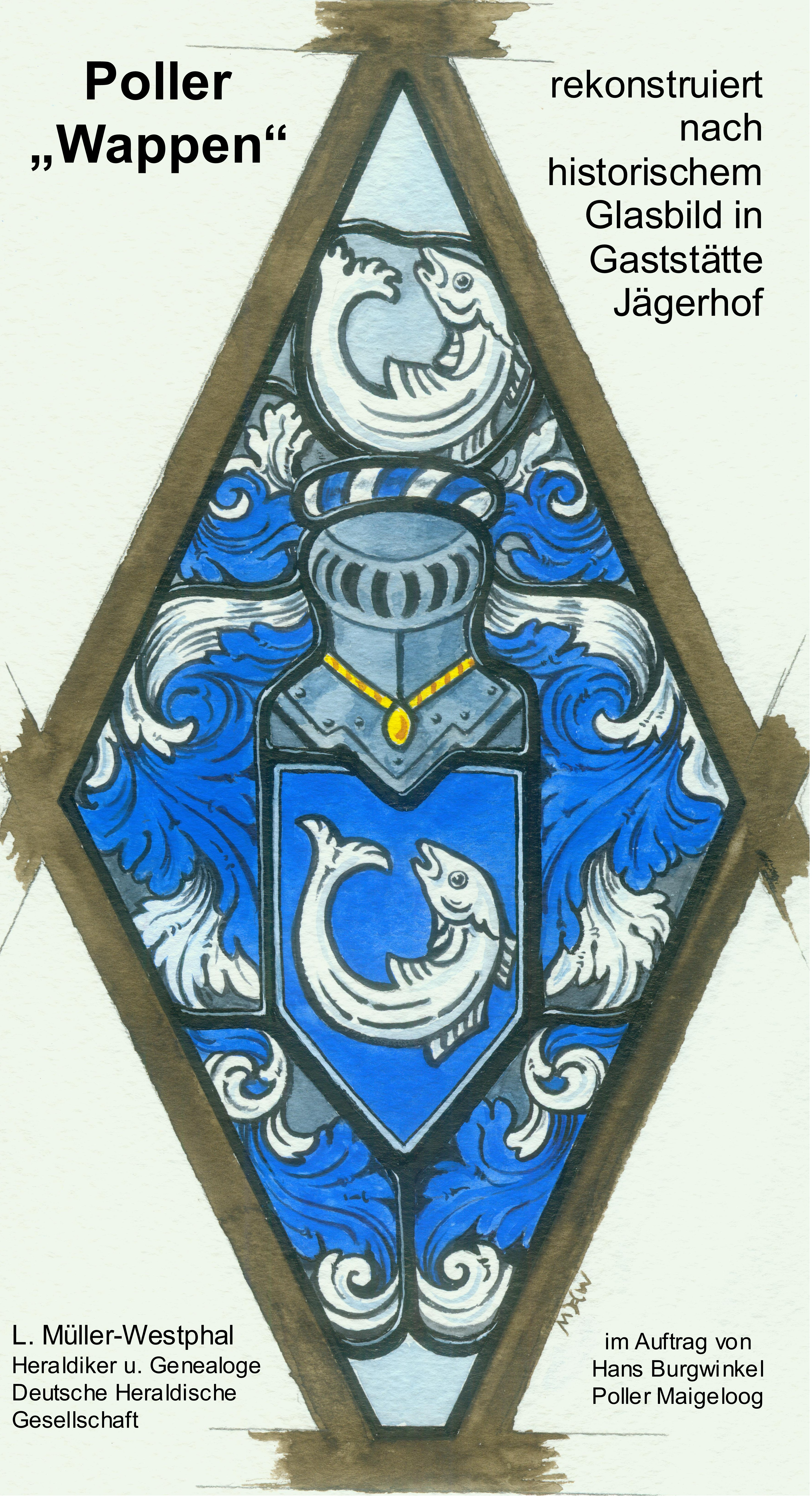 Poller Wappen rekonstruiert nach historischem Glasbild (um 1910) in Gaststätte „Zum Jägerhof“ der Familien Bietme-Batholomee / Therhag von L. Müller-Westphal im Auftrag von Hans Burgwinkel 2008. Die historische Herkunft des Wappens ist (noch) ungeklärt, da es über ein Poller Wappen keine (weitere) historische Erwähnung gibt.